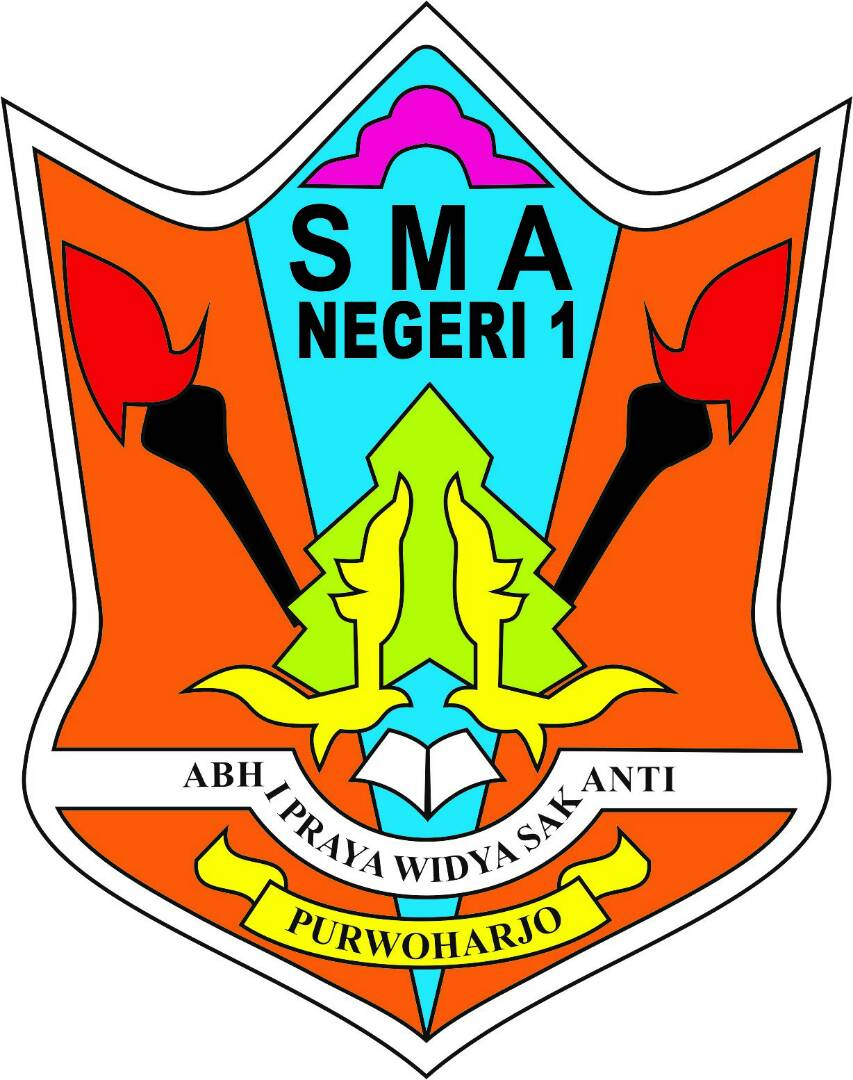 Logo Sman 1 Purwoharjo